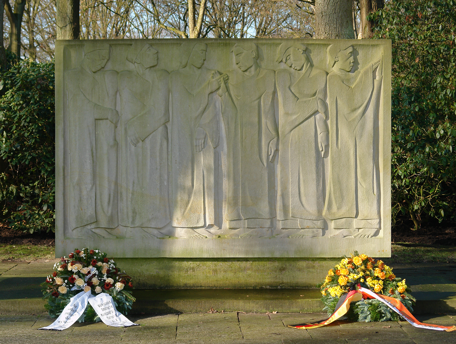 Osterholzer Friedhof in Bremen: Ehrenanlage für deutsche Soldaten und Opfer von Konzentrations- und Arbeitslagern. Platte mit 6 weiblichen Figuren als Symbol für Brüderlichkeit und Tod, gestaltet von Paul Halbhuber Das abgebildete Objekt ist ein geschütztes Kulturdenkmal in der Freien Hansestadt Bremen, mit der Nr. 0969,T006 beim Landesamt für Denkmalpflege registriert.